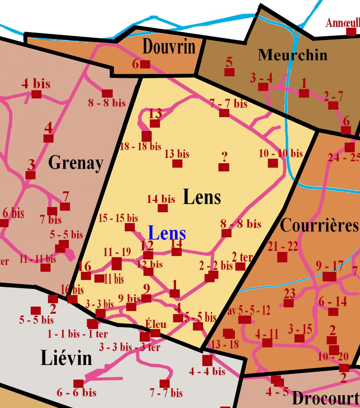 La Compagnie des mines de Lens est une compagnie minière qui a exploité la houille dans le bassin minier du Nord-Pas-de-Calais. La carte indique l'emplacement des puits de la Compagnie parmi les fosses et les concessions minières avoisinantes. Concession de Lens Concession de Douvrin Concession de Meurchin Concession de Courrières Concession de Drocourt Concession de Liévin Concession de Grenay